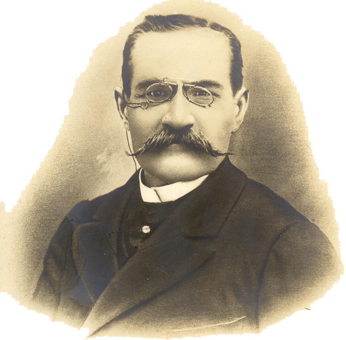 photographie de Léon Denis retouchée. Photo prise vers 1870.